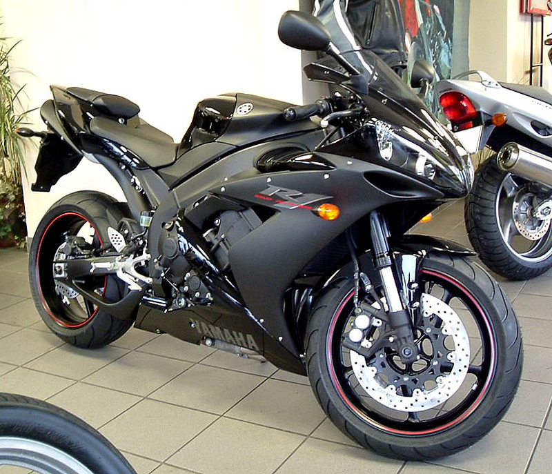 Yamaha YZF-R1 (2006)